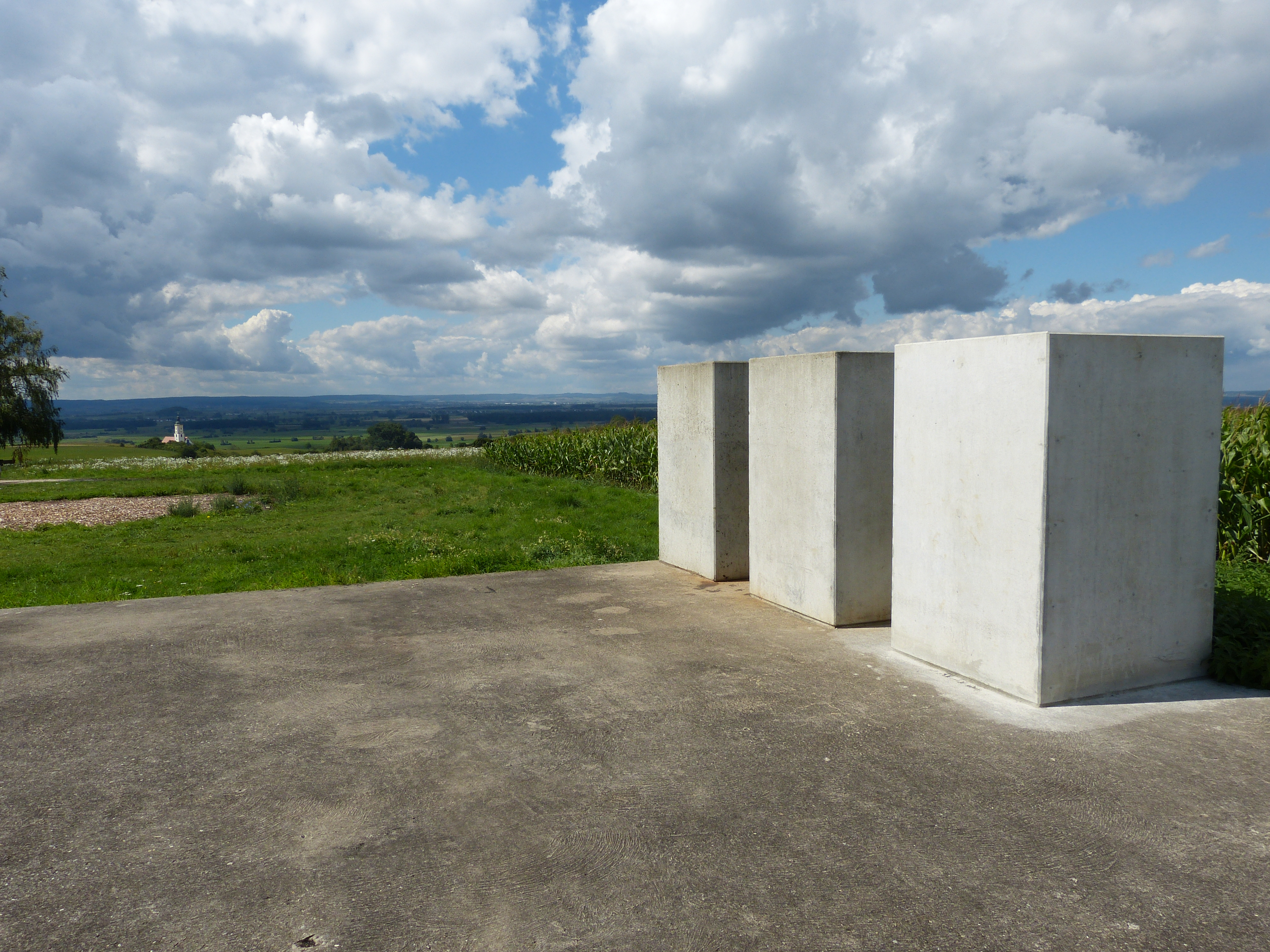 Zeitpyramide 2013